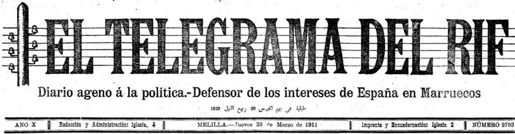 Cabecera de El Telegrama del Rif (1911)